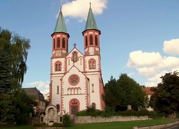 Das Foto zeigt die Kirche von Hofbieber. Im Vordergrund kann man das Kriegerdenkmal für die Gefallenen des Ersten Weltkrieges erkennen. Copyright Status: GNU Freie Dokumentationslizenz